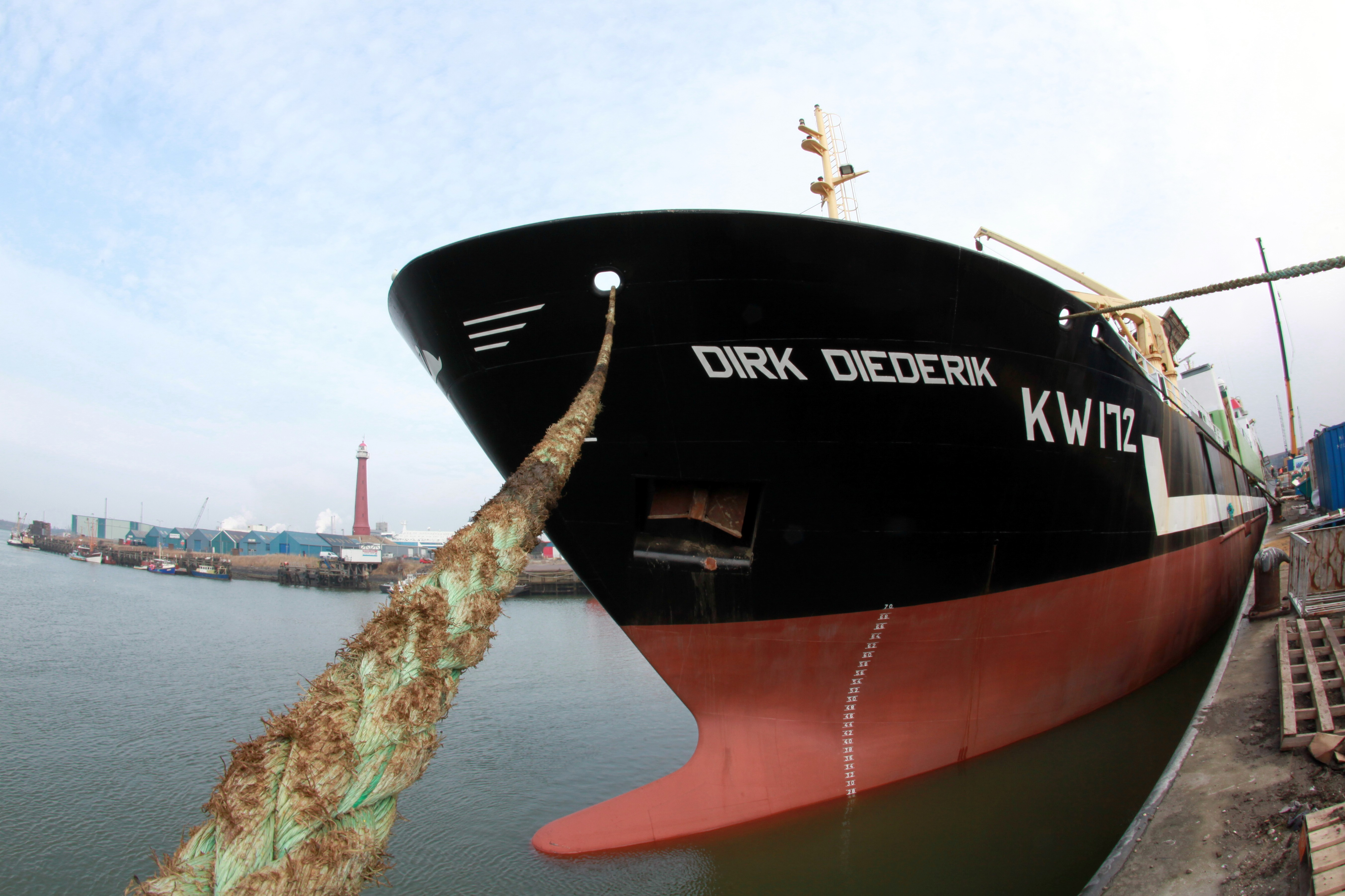 KW-172 Dirk Diederik Katwijk IMO 8918318 build 1990